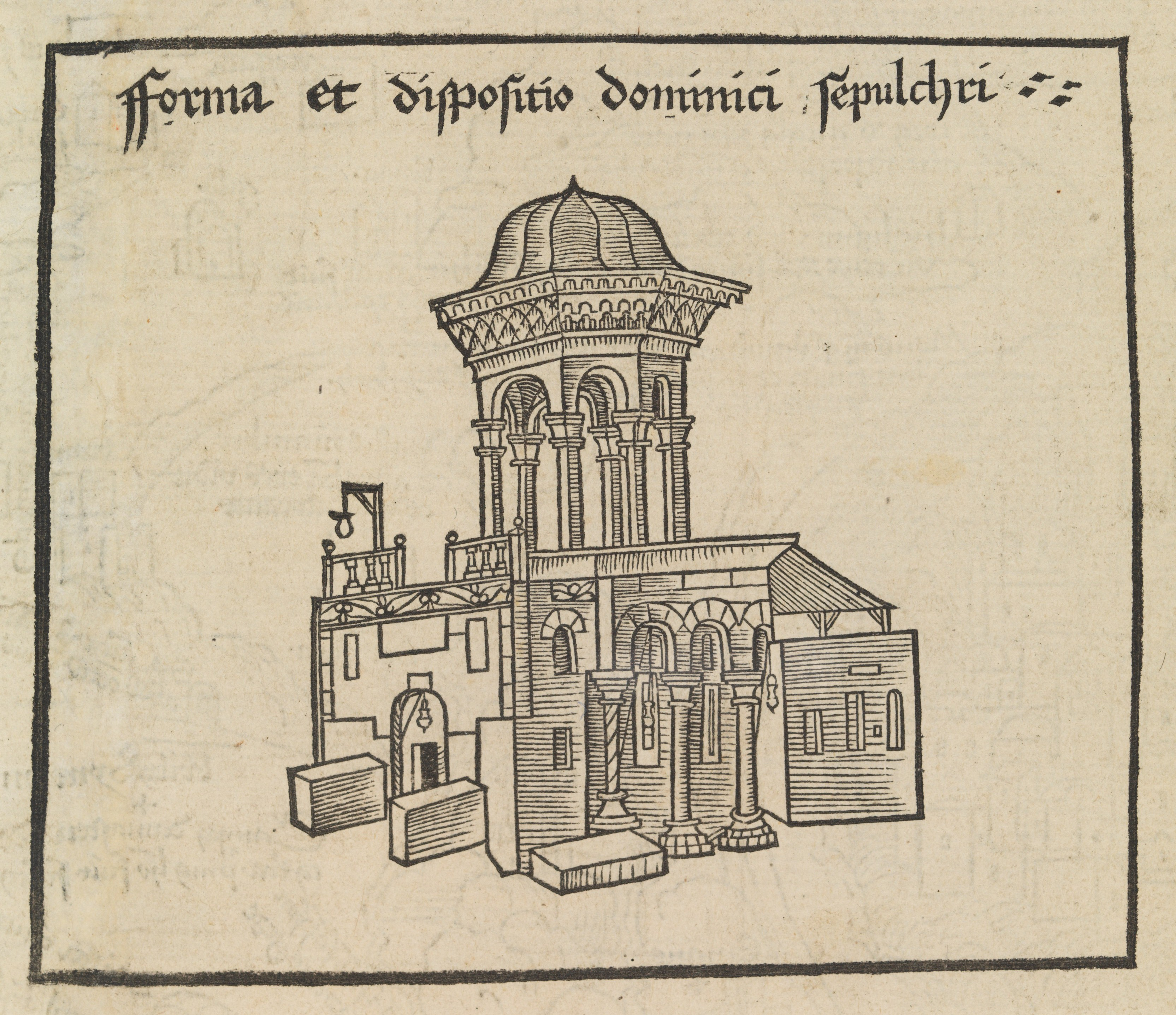 Book; Books